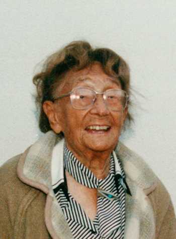 Foto: privat